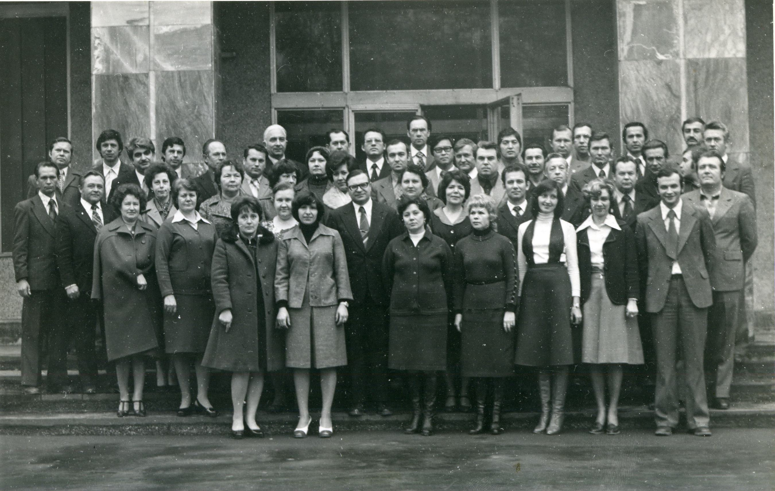 Фотография. Юбилей ТашКБМ 1979 год. Ветераны перед центральным входом на предприятие.